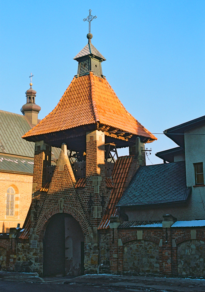 Dzwonnica kościoła Franciszkanów w Krośnie, w głębi Kościół